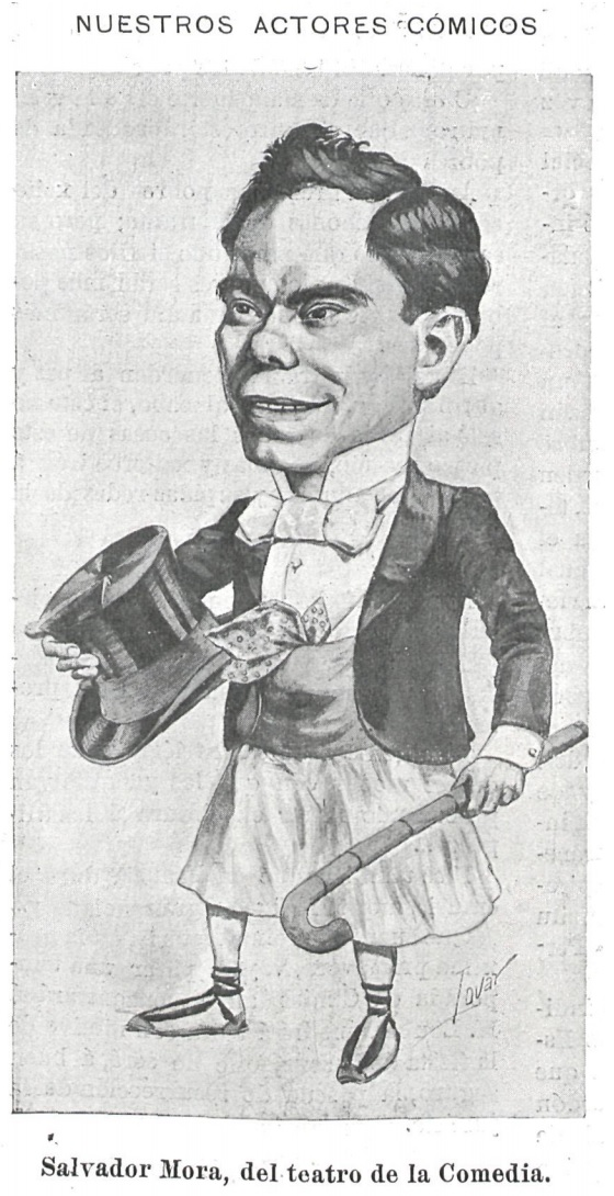 Nuestros actores cómicos